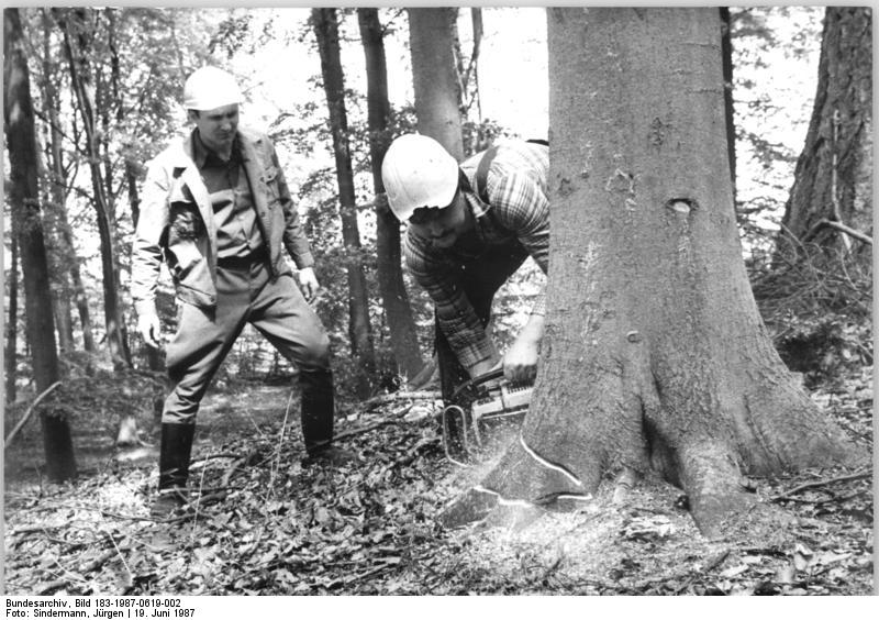 Wismar, Ausbildung zum Forstfacharbeiter ADN-ZB Sindermann 19.6.1987 Bez. Rostock: Jugend- An der Betriebsberufsschule "Johannes Warnke" des Staatlichen Forstwirtschaftsbetriebes Wismar werden gegenwärtig 170 Jugendliche als Facharbeiter für Forstwirtschaft ausgebildet. Etwa zwei Drittel von ihnen schließen nach dreijähriger Lehrzeit zudem mit dem Reifezeugnis der 12. Klasse ab. Zur berufspraktischen Ausbildung gehören auch das Holzeinschlagen, die Pflanzenzucht und die Pflege von Jungbeständen. Beim Holzeinschlag ist Uwe Baumgarten, Lehrling im dritten Ausbildungsjahr mit Abitur. Fachgerecht wird ein Fallkeil mit einem Sol- und Dachschnitt mit der Motorsäge gesetzt. Nur Lehrmeister Jörg Stübe darf bei dieser Arbeit in der Nähe seines Schützlings bleiben um die einzelnen Arbeitsschritte zu beobachten. - siehe auch 1987-0619-1N